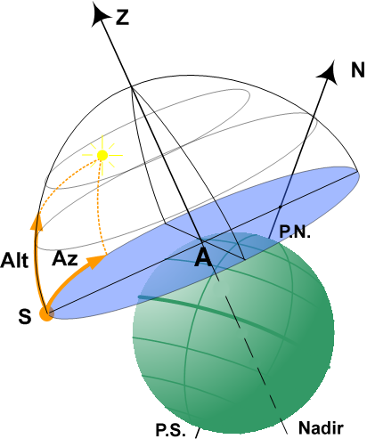 cénit nadir y allugamientu na superficie